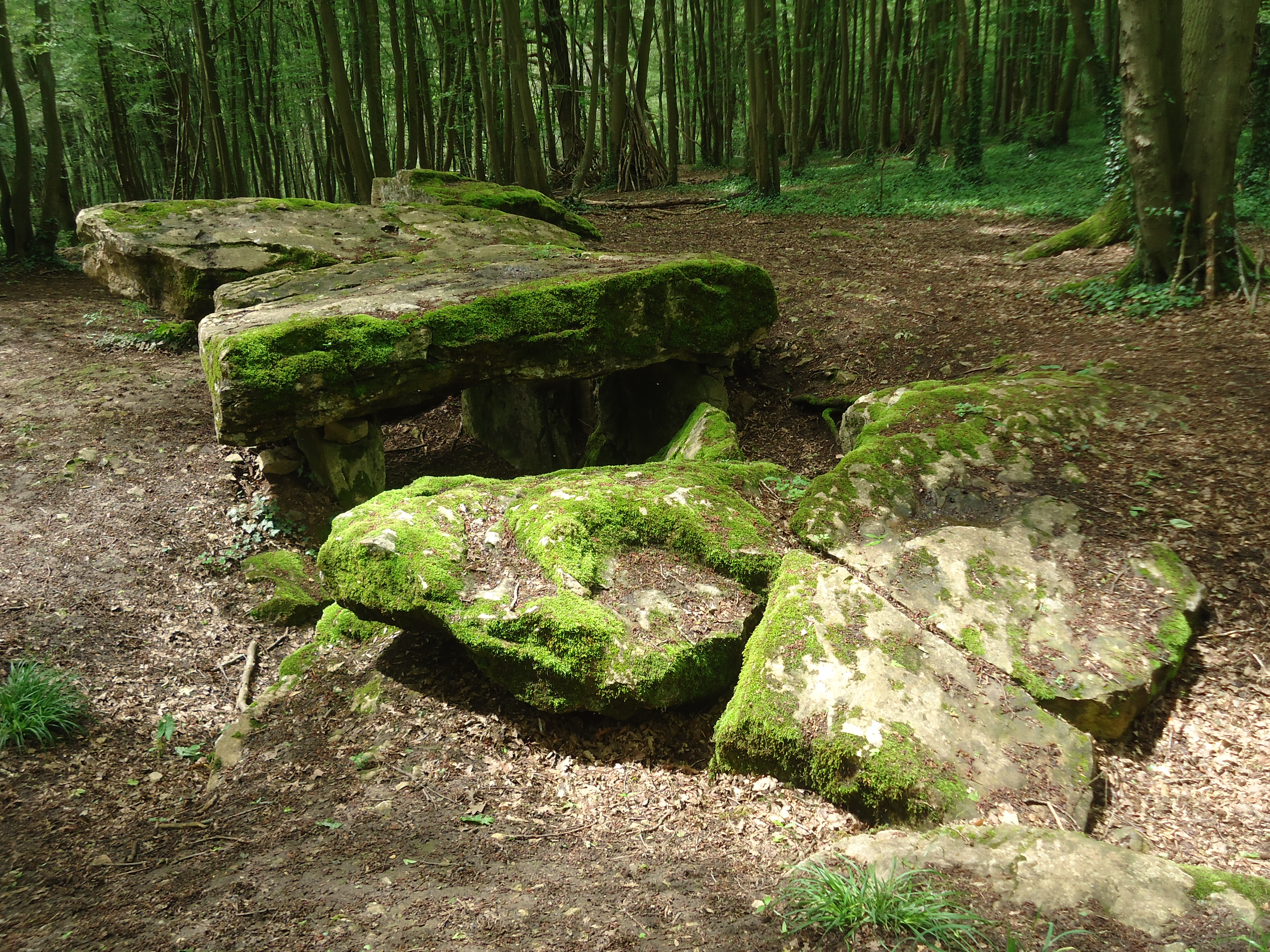 Allée couverte de Dampsmesnil dans l'Eure